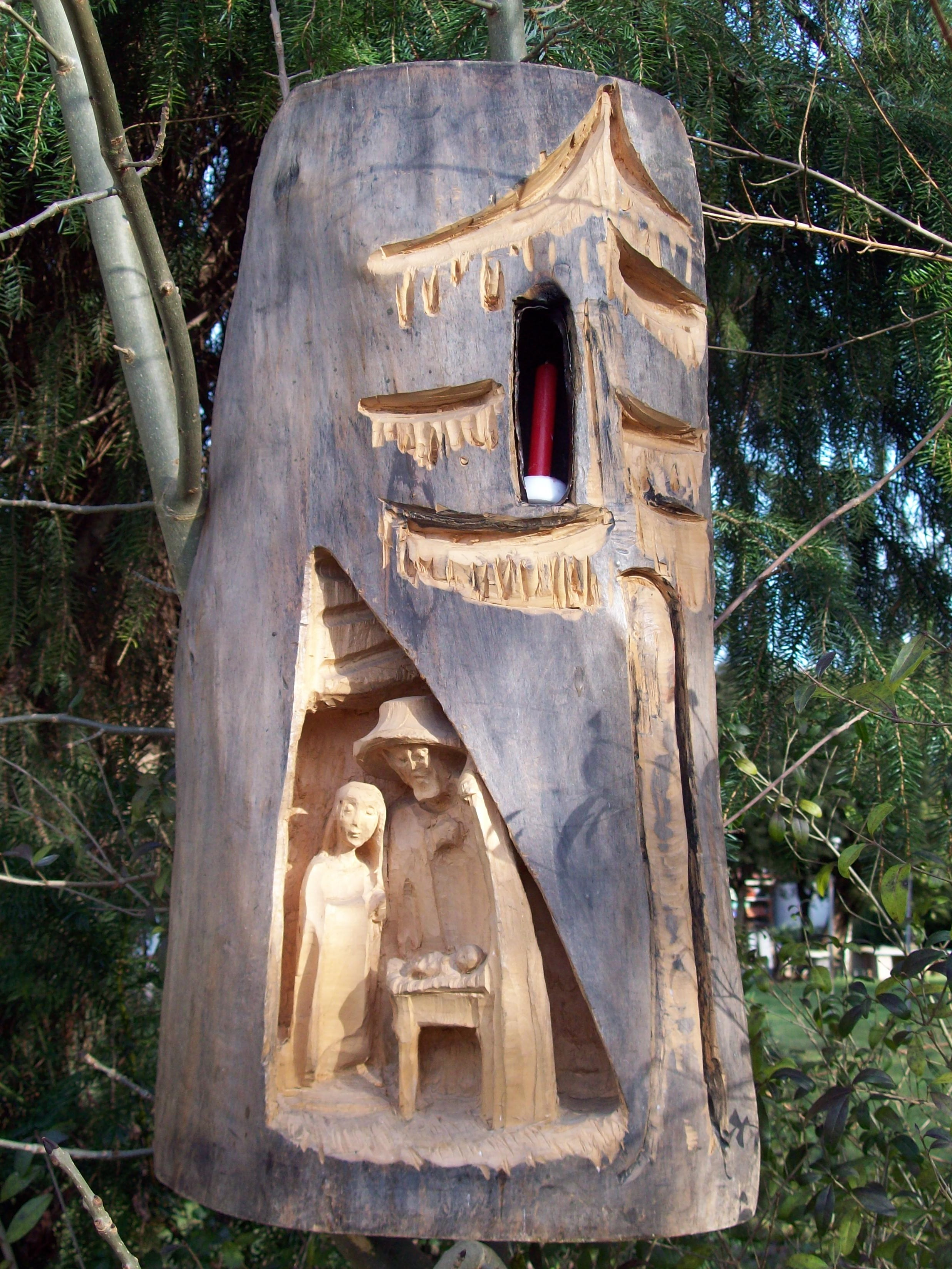 Bernardine Weber bezeichnete diese Krippe - eine von vielen ihres Werkes - als ihre ganz persönliche "Lieblingskrippe.